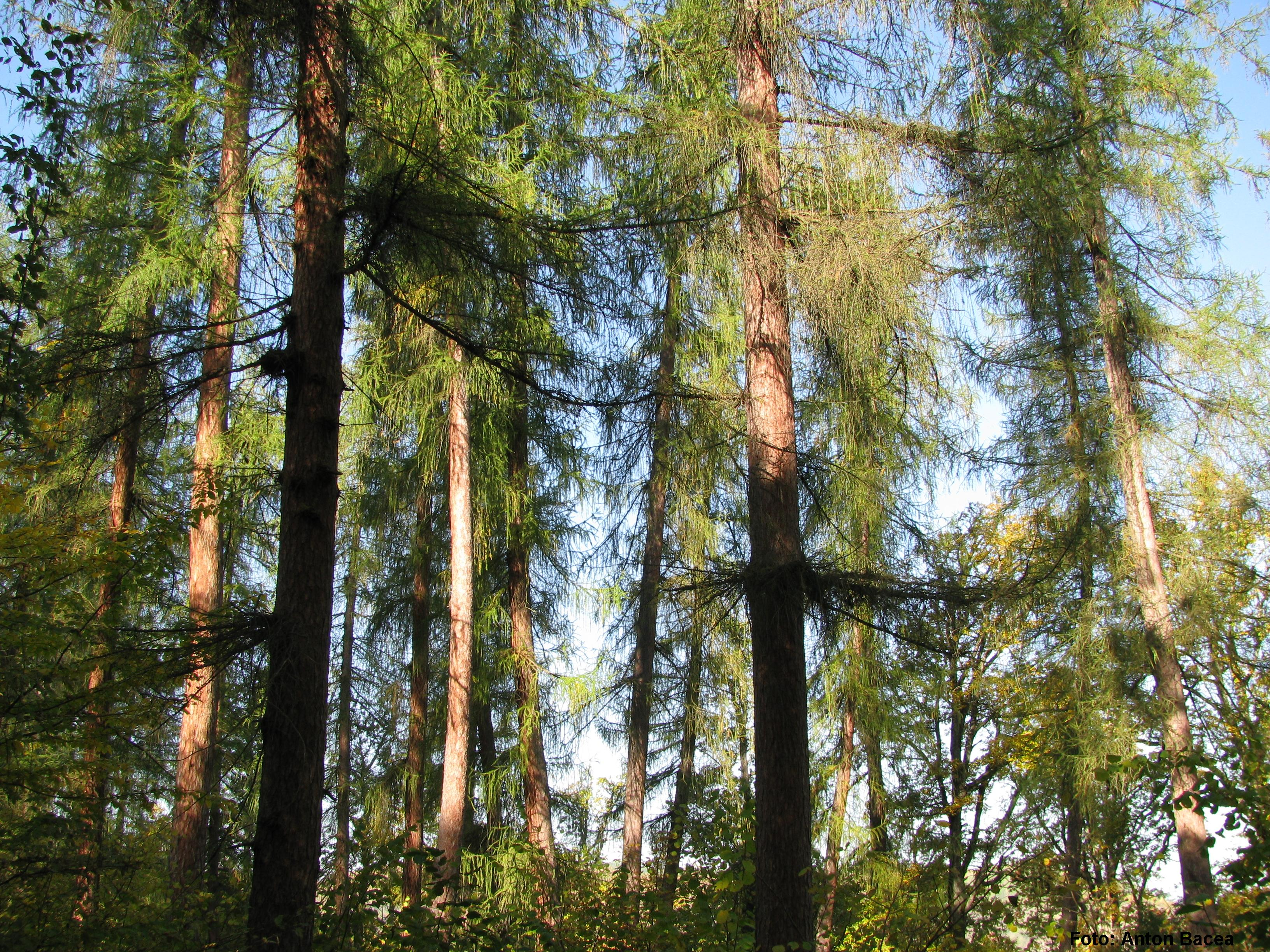 European Larches in Coștiui/Rónaszék, Romania